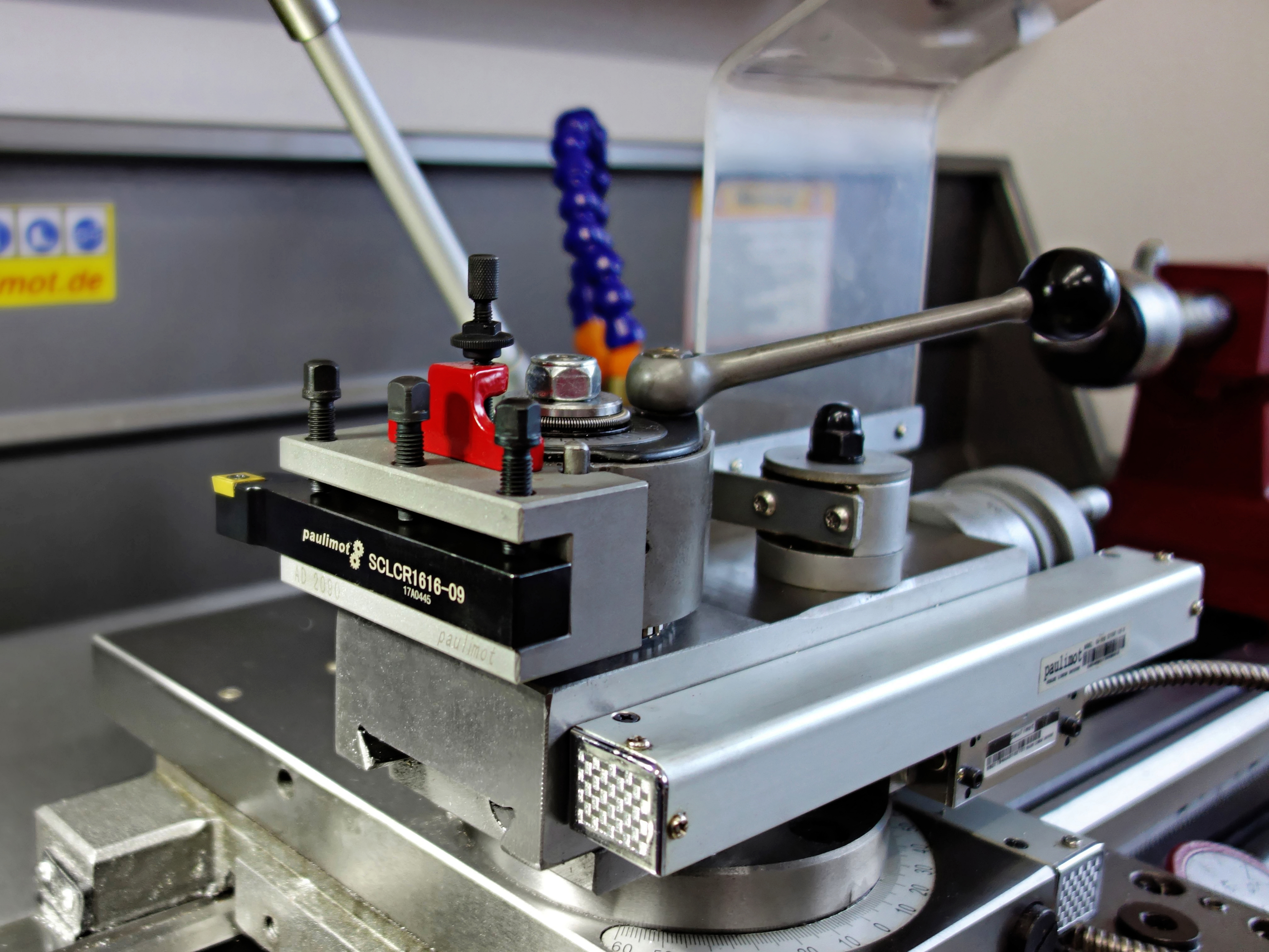 Montagebeispiel von dem System "Multifix" mit dem paulimot-Stahlhalter AD2090 und einem Drehstahl (SCLCR1616-09)